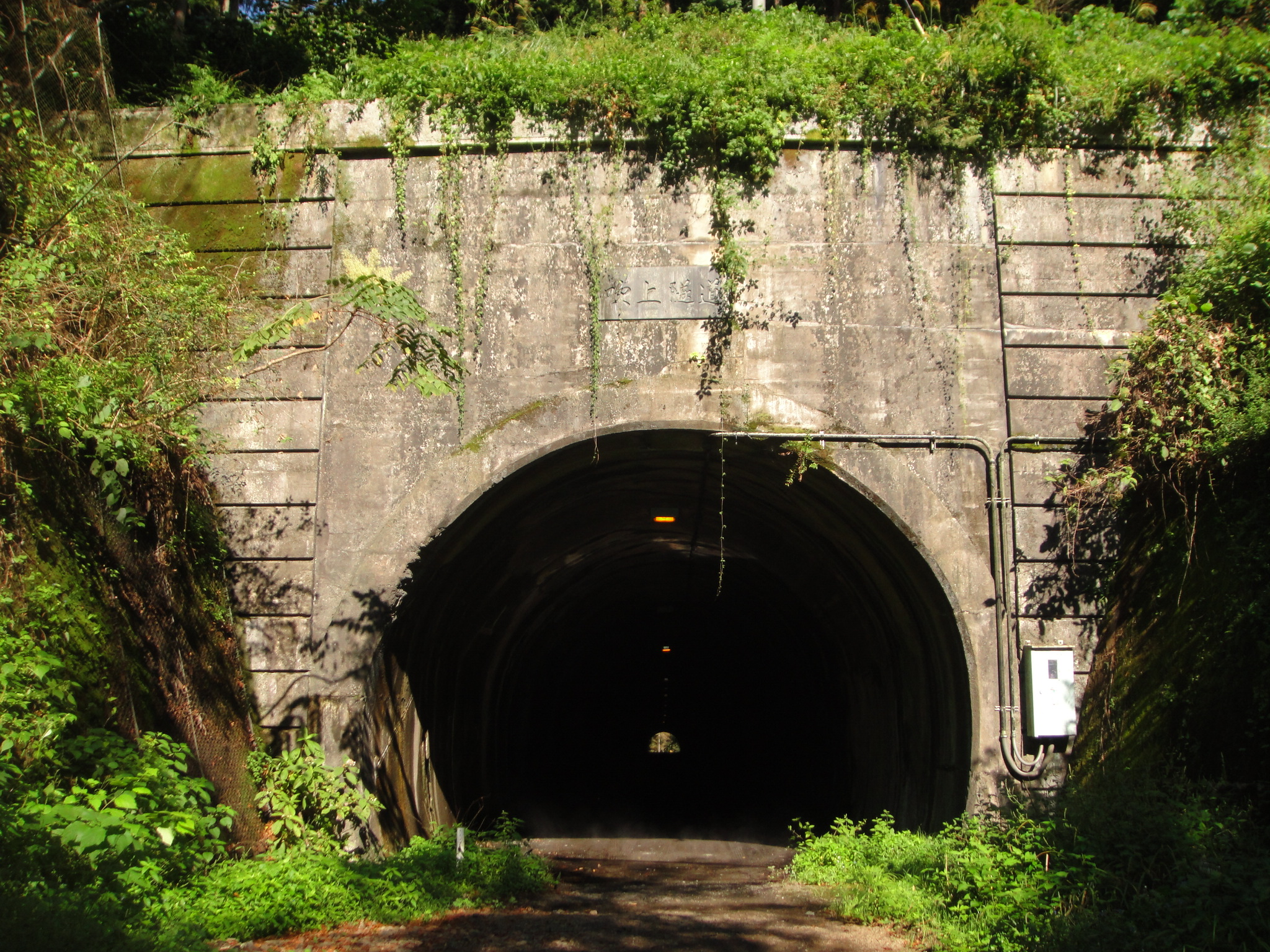 旧吹上トンネル 南側